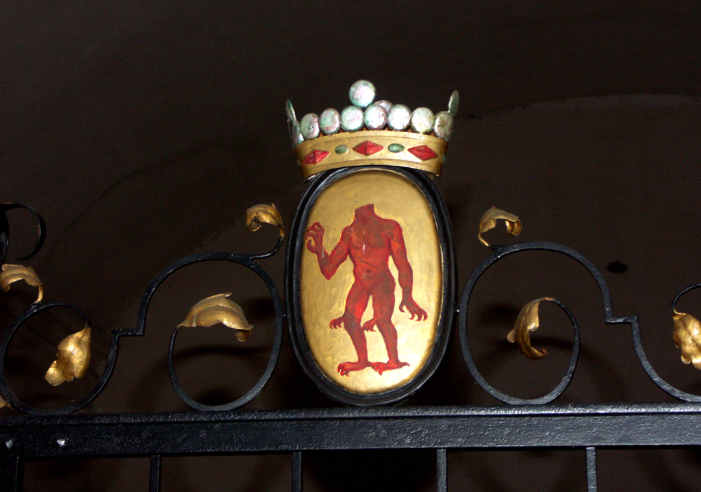 Trolleättens vapen vid gravkammaren i Näs kyrka på Trollenäs.